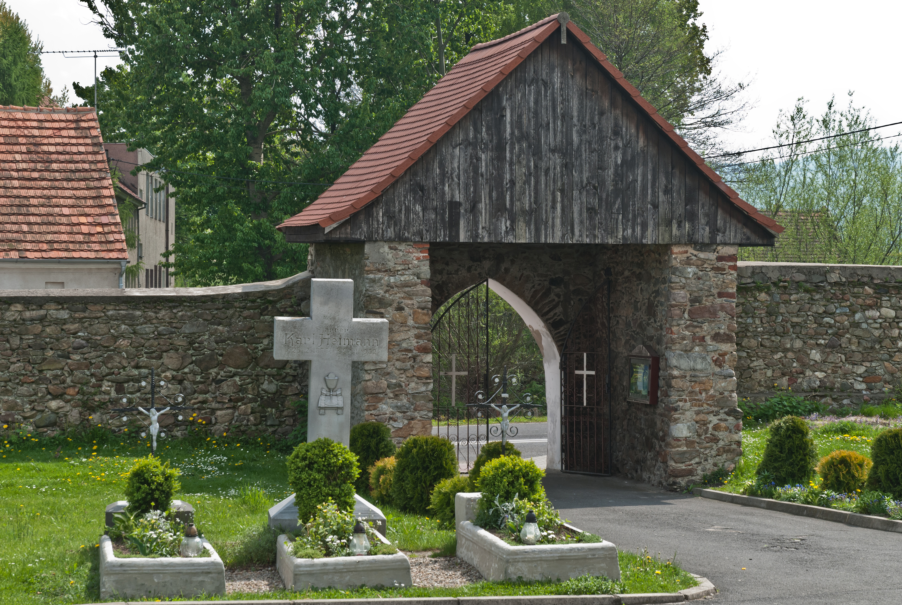 Kamienica, mur z bramkami, XVI, XVIII